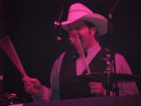 Butch